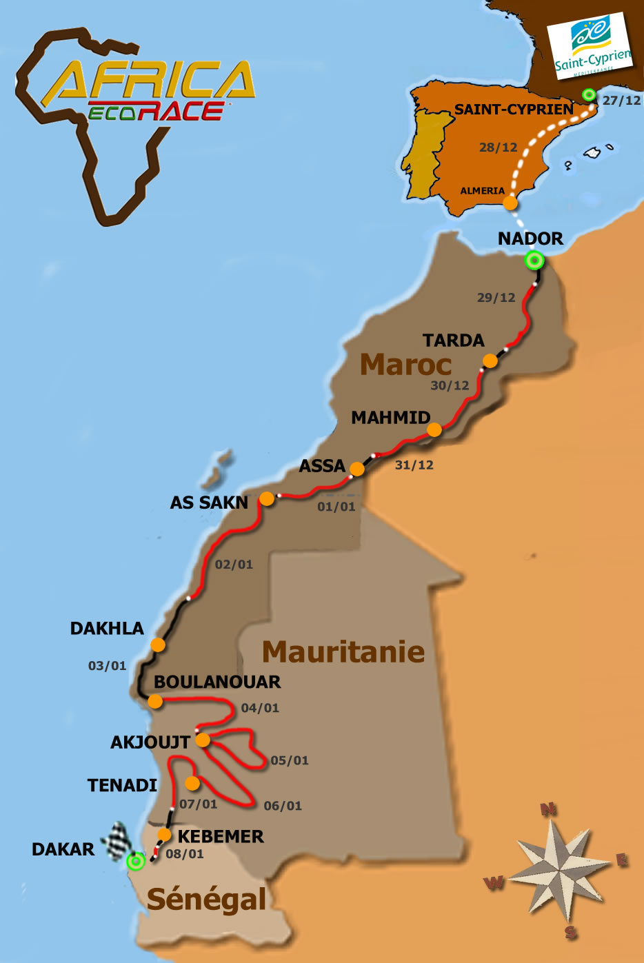 Carte Parcours AER 2012